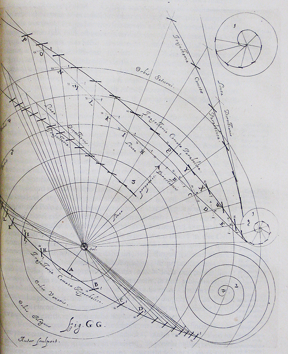 Tavola GG dell'opera Cometographia di Johannes Hevelius